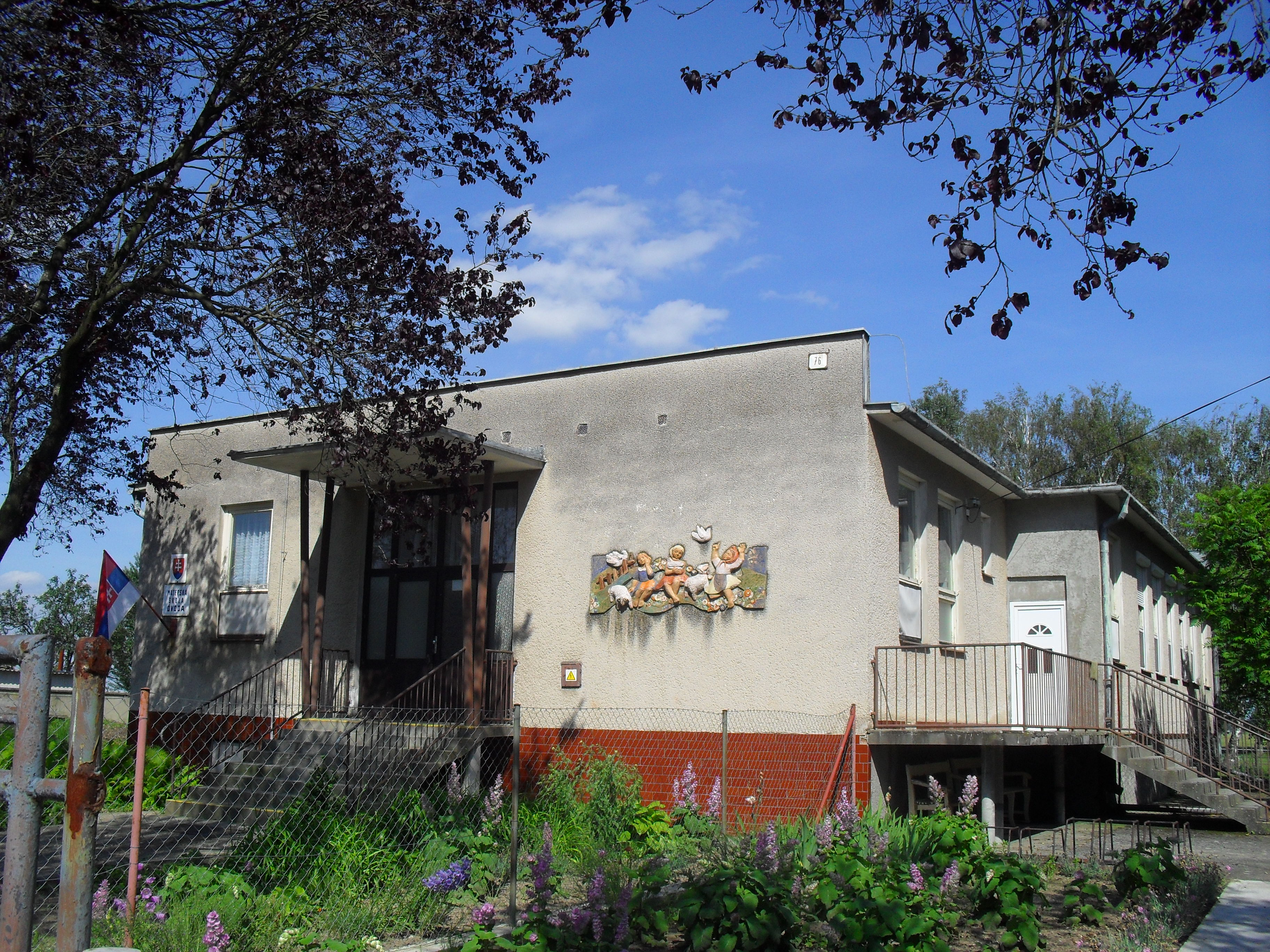 Vágfüzes - óvoda